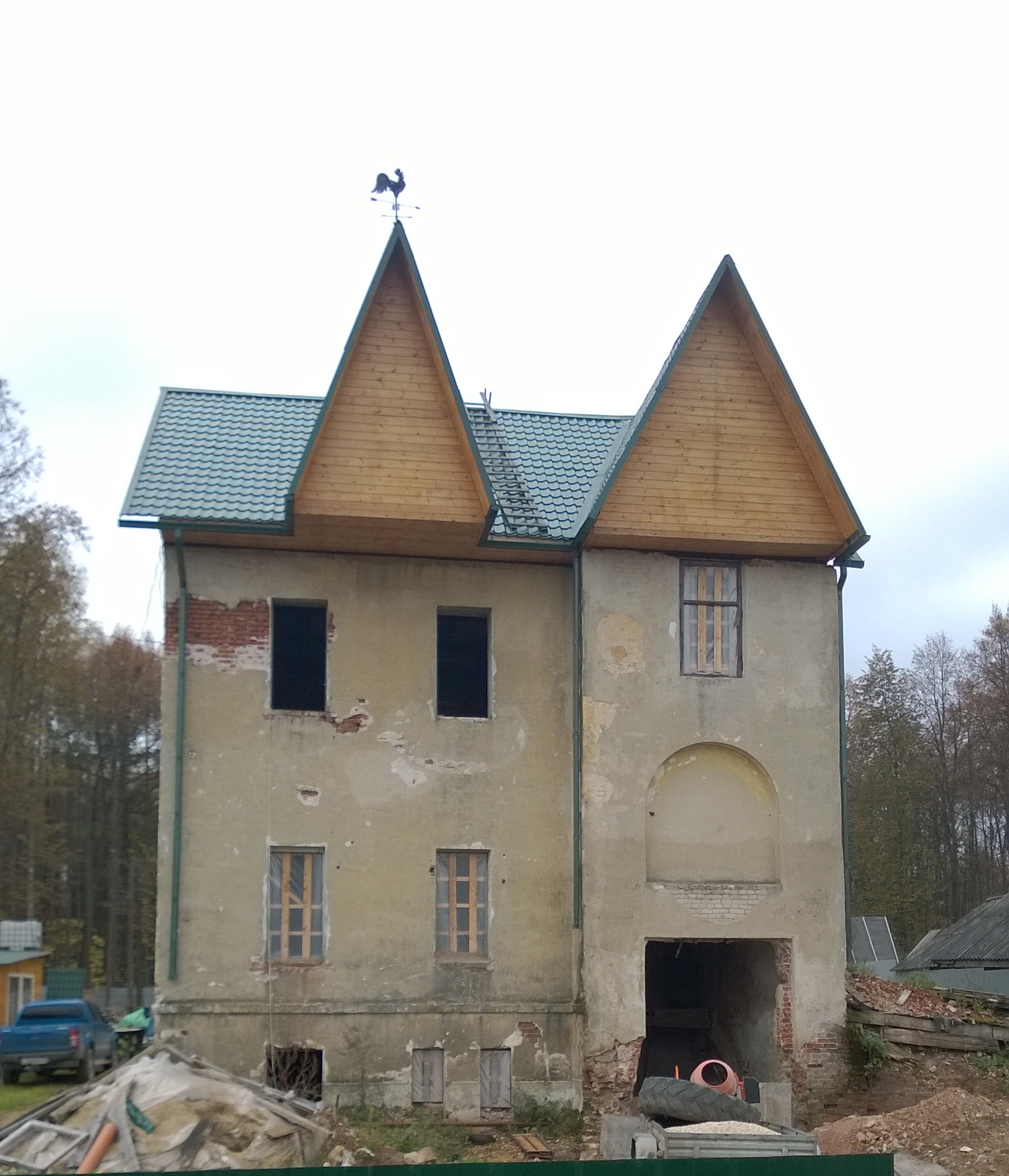 Главный дом: Костино, Петушинский район, Владимирская область